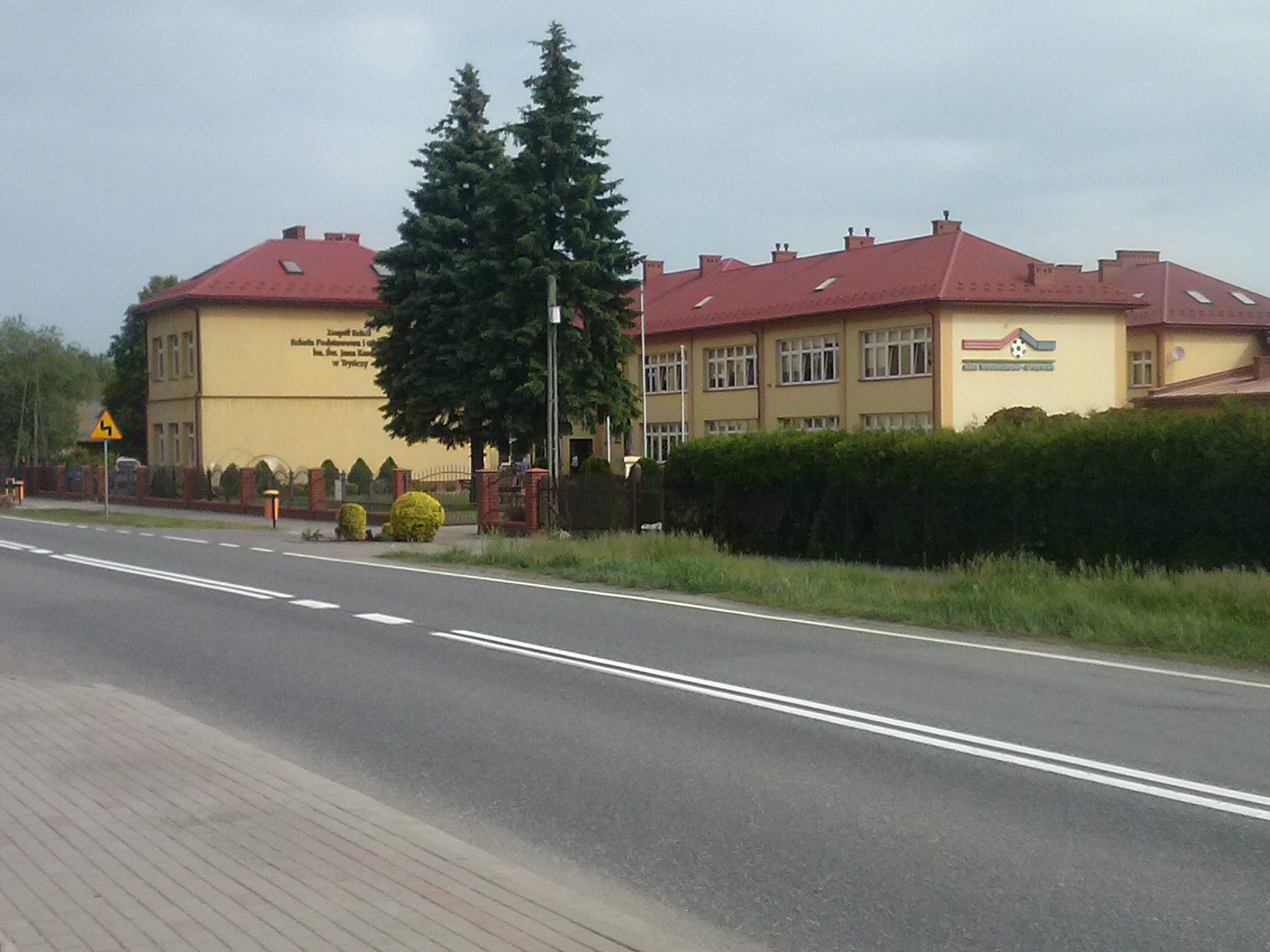 Szkoła podstawowa w Tryńczy